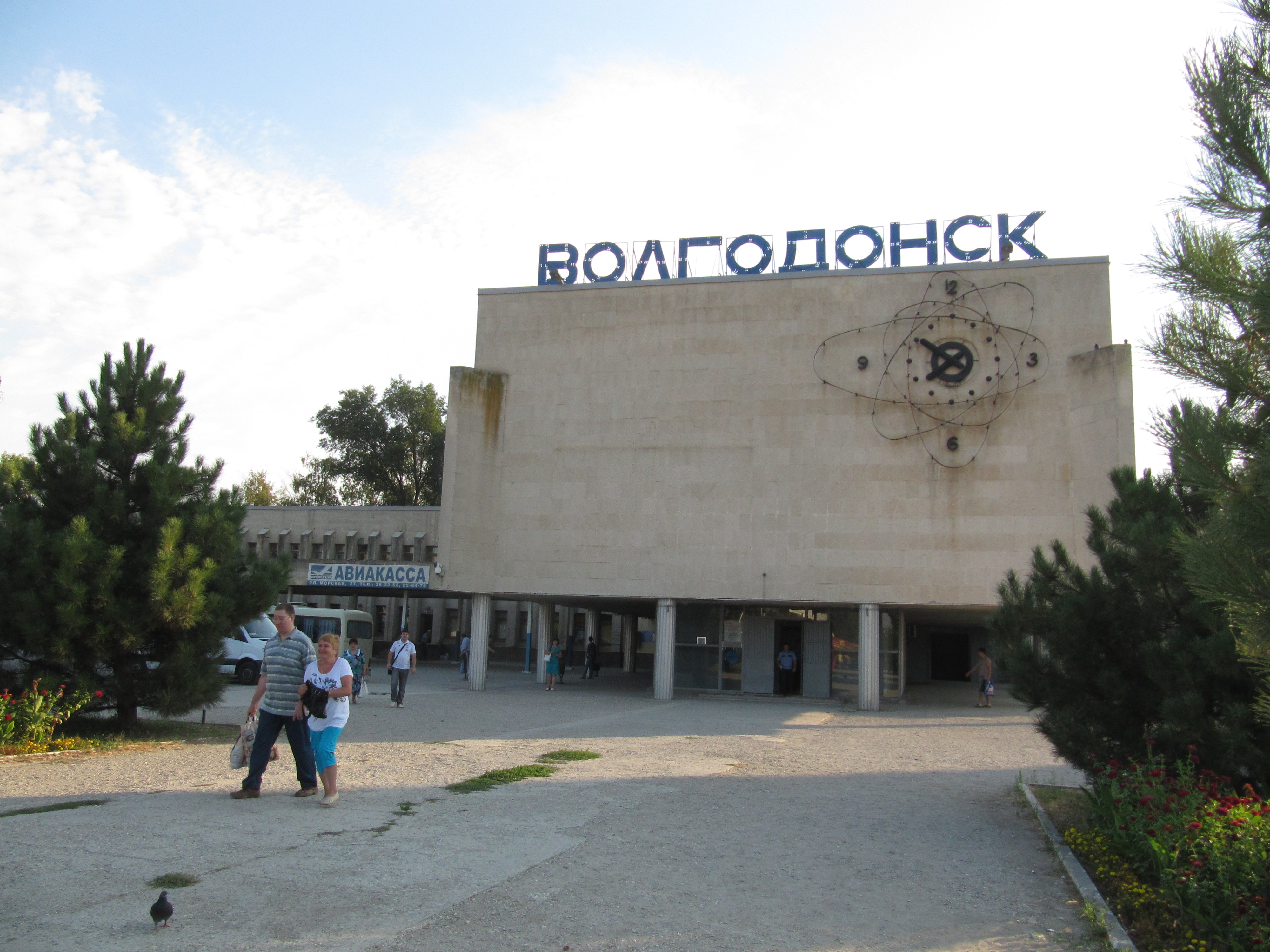 Автостанция, Вогодонск